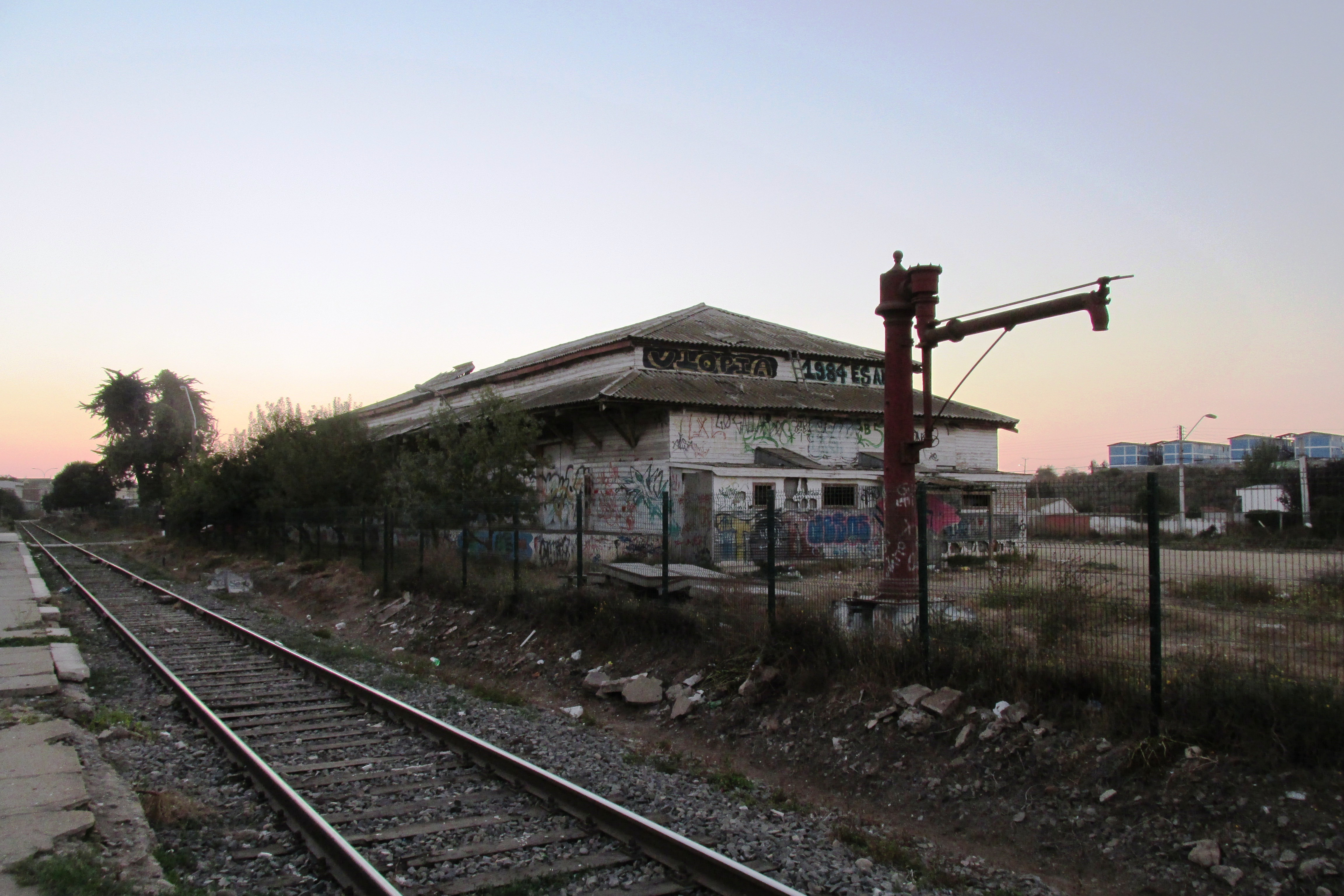 Vista Estación Ferrocarriles y Caballo de Agua en Lllolleo comuna San Antonio regi̟on de Valparaiso Chile